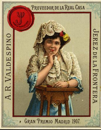 Vine label. Flamenca con mantilla blanca. Jerez.